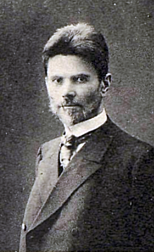 Наум Варлаамович Теребинский (вариант отчества Варламович; 1 декабря 1851 — после 1908) — врач, гласный Оренбургской городской думы, депутат III Государственной думы (1907—1908).